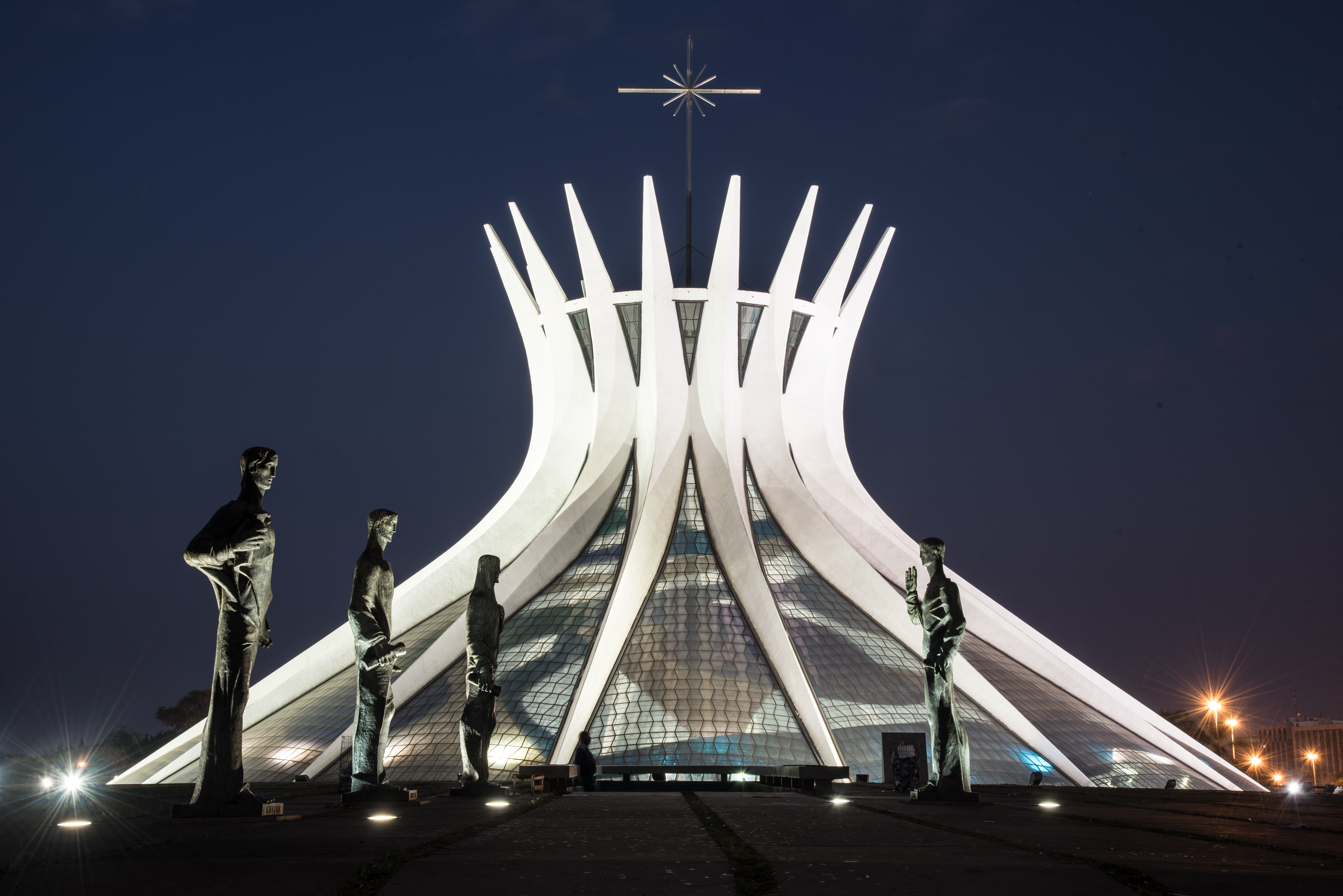 Catedral Metropolitana at dawn.